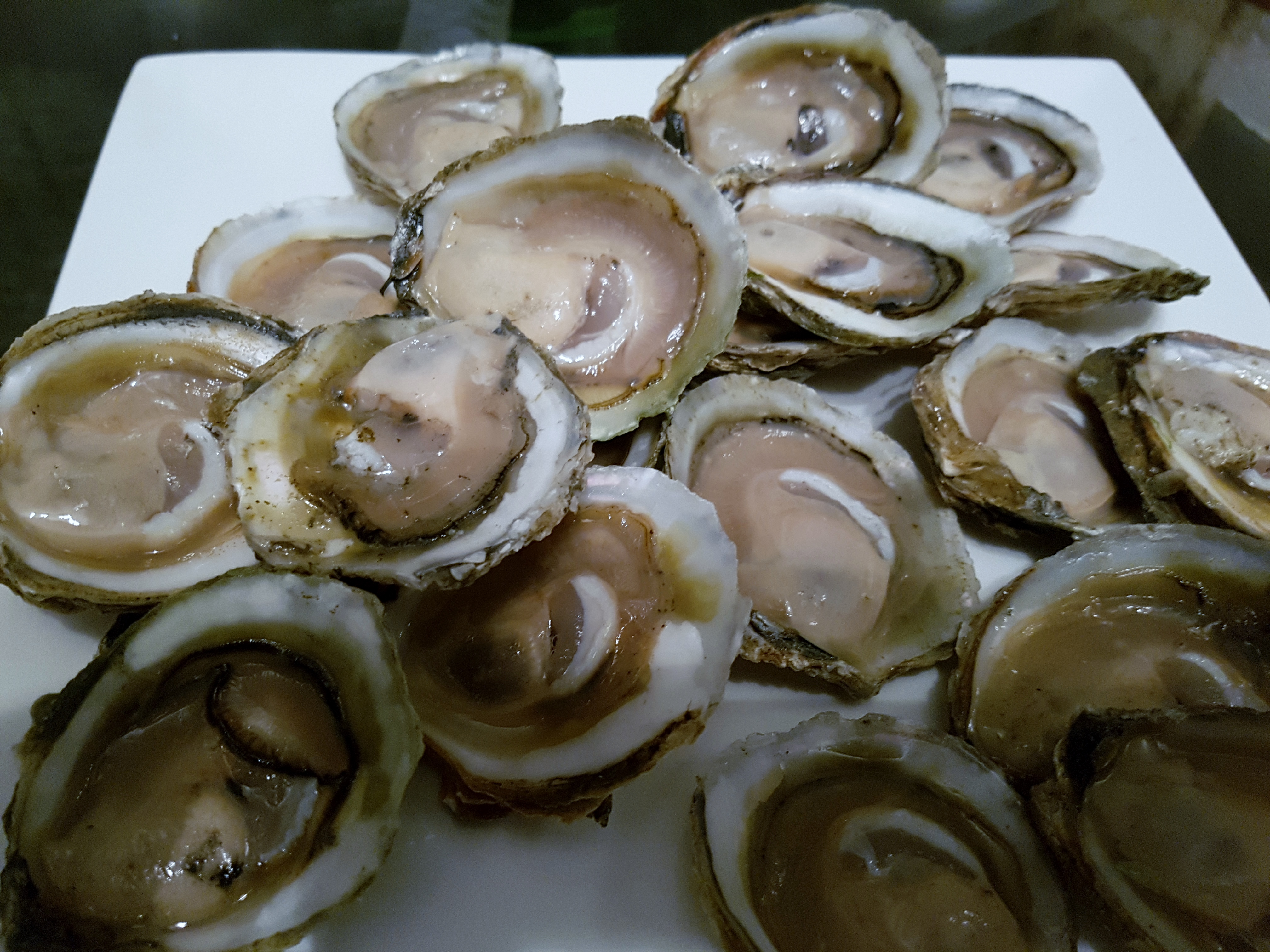 Plato de ostras chilenas (Ostrea chilensis) provenientes de Chiloé.